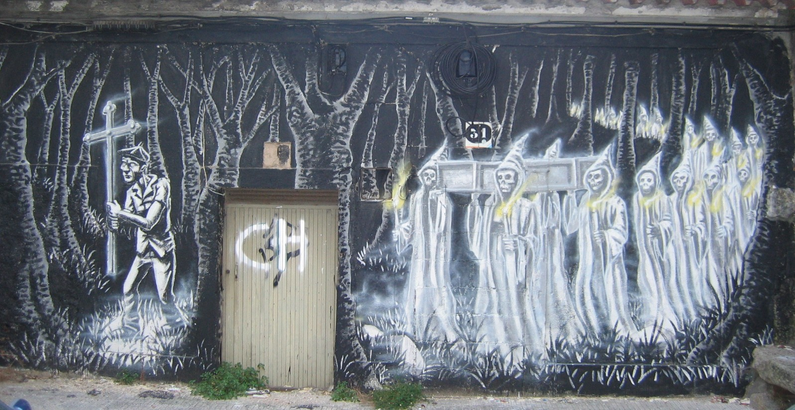 A Santa Compaña (graffiti) na rúa Almirante Matos, Pontevedra.